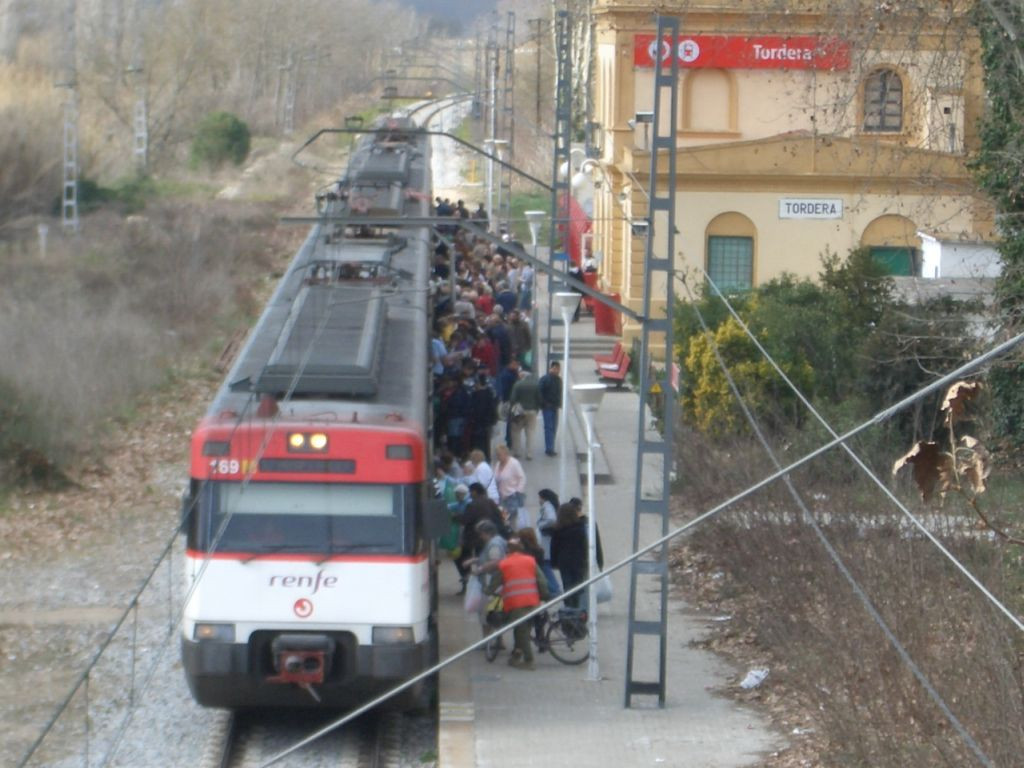 Estació de Tordera (Maresme, Catalunya), 17 febrer 2008